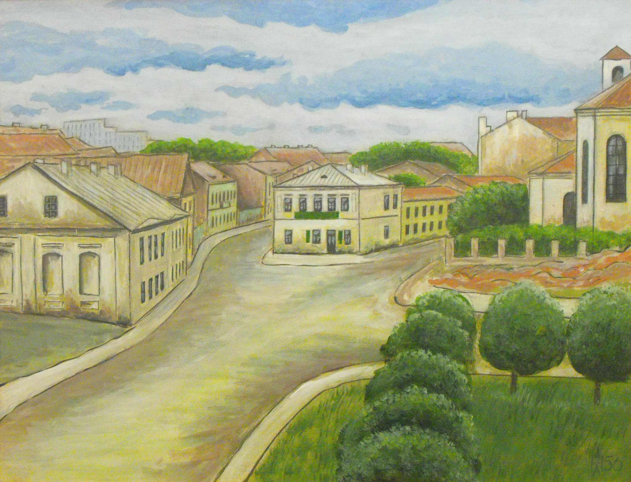 Минск, ул. Немига, 1956 г. Исторический центр Минска. Бывшее замчище. Вид с площади 8-го Марта на Немигу - на перекрёсток улиц Немиги и Островского. Сделано по акварели 1956 года в 1967 году. Яичная темпера. ДВП. 66х50,5 см. Художник - Анатолий Наливаев.